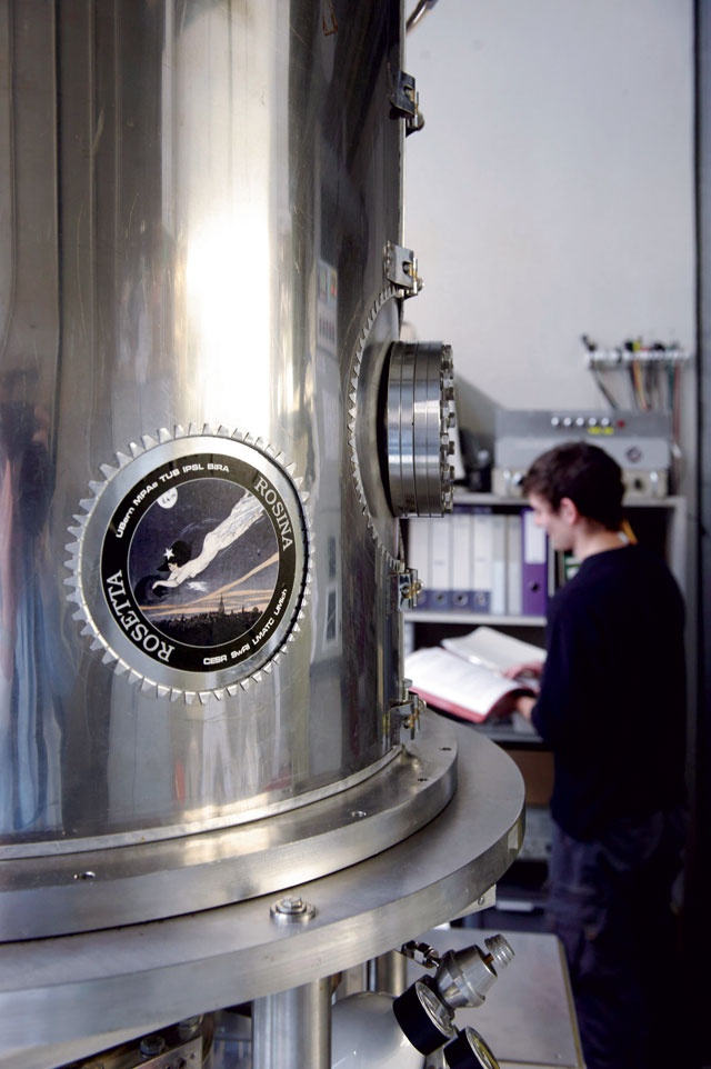 Die Abteilung für Weltraumforschung und Planetologie des Physikalischen Instituts der Uni Bern arbeitet im Rahmen der Rosetta-Mission der European Space Agency (ESA) am Massenspektrometer ROSINA. (Fotograf: Adrian Moser)